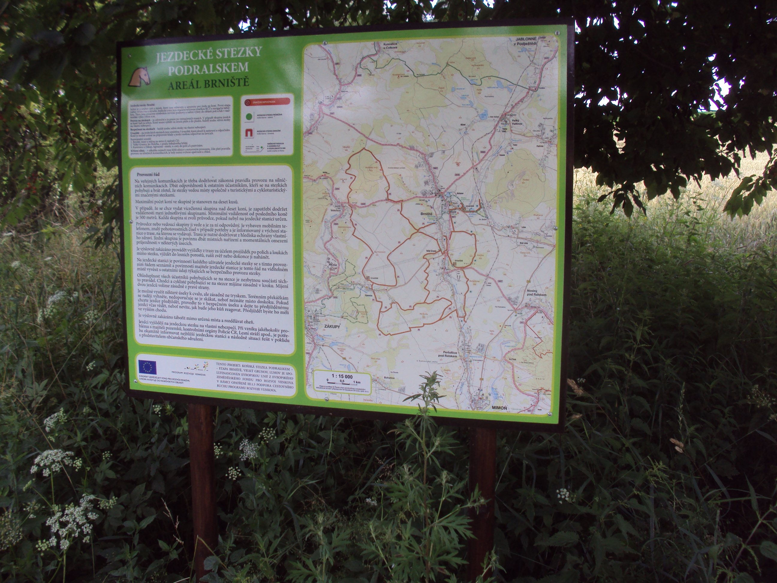 Tabule Jezdecké stezky Podralskem, tato na okraji obce Kamenice